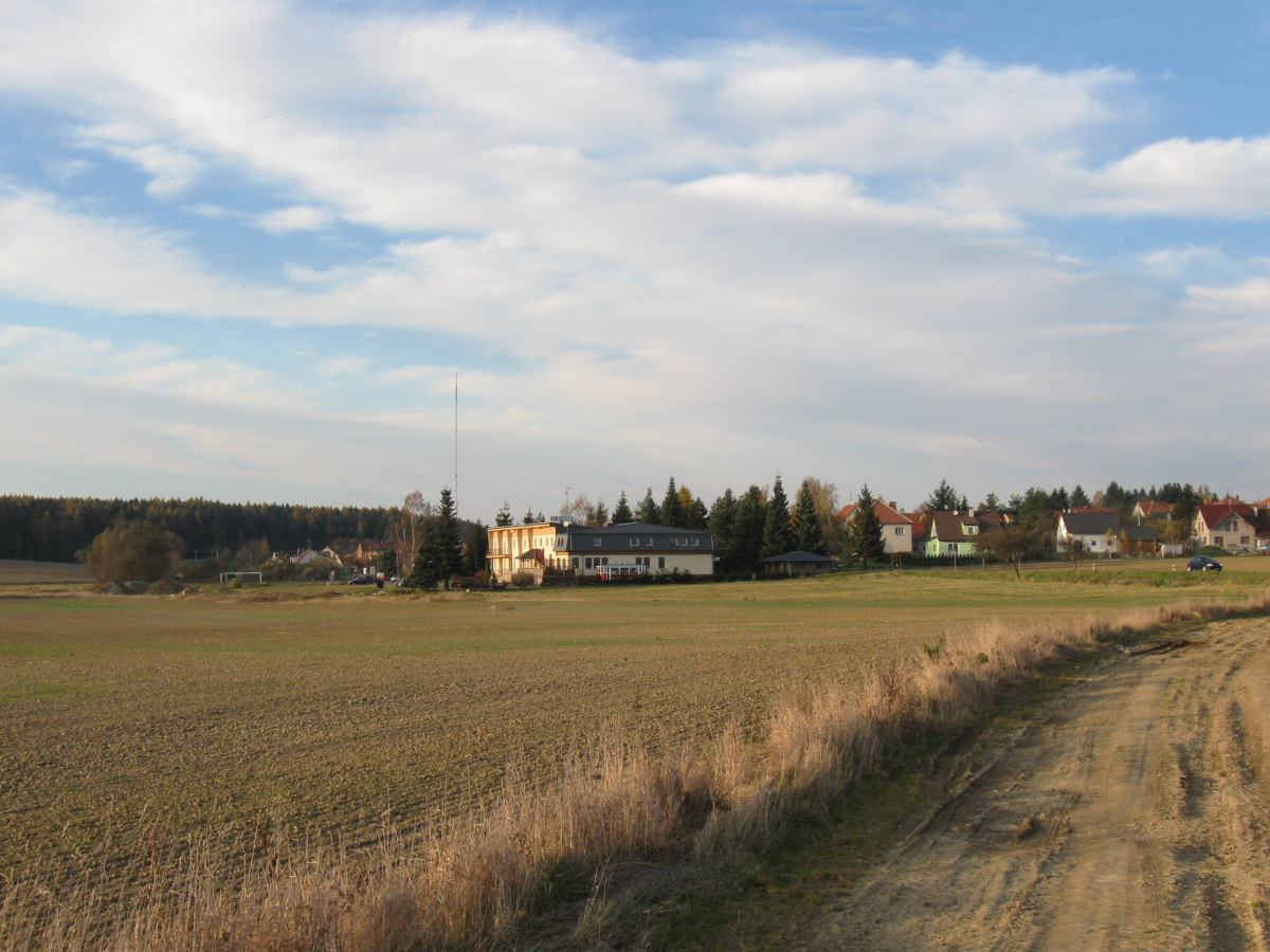 Hotel Vrchovina v Podomí, v pozadí vysílač Kojál